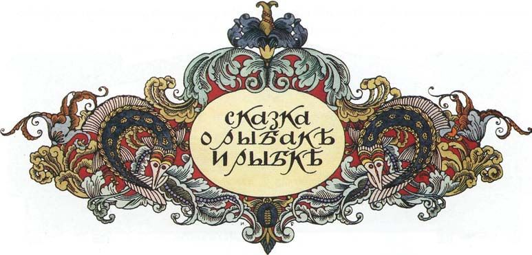 Заставка к "Сказке о рыбаке и рыбке", 1908